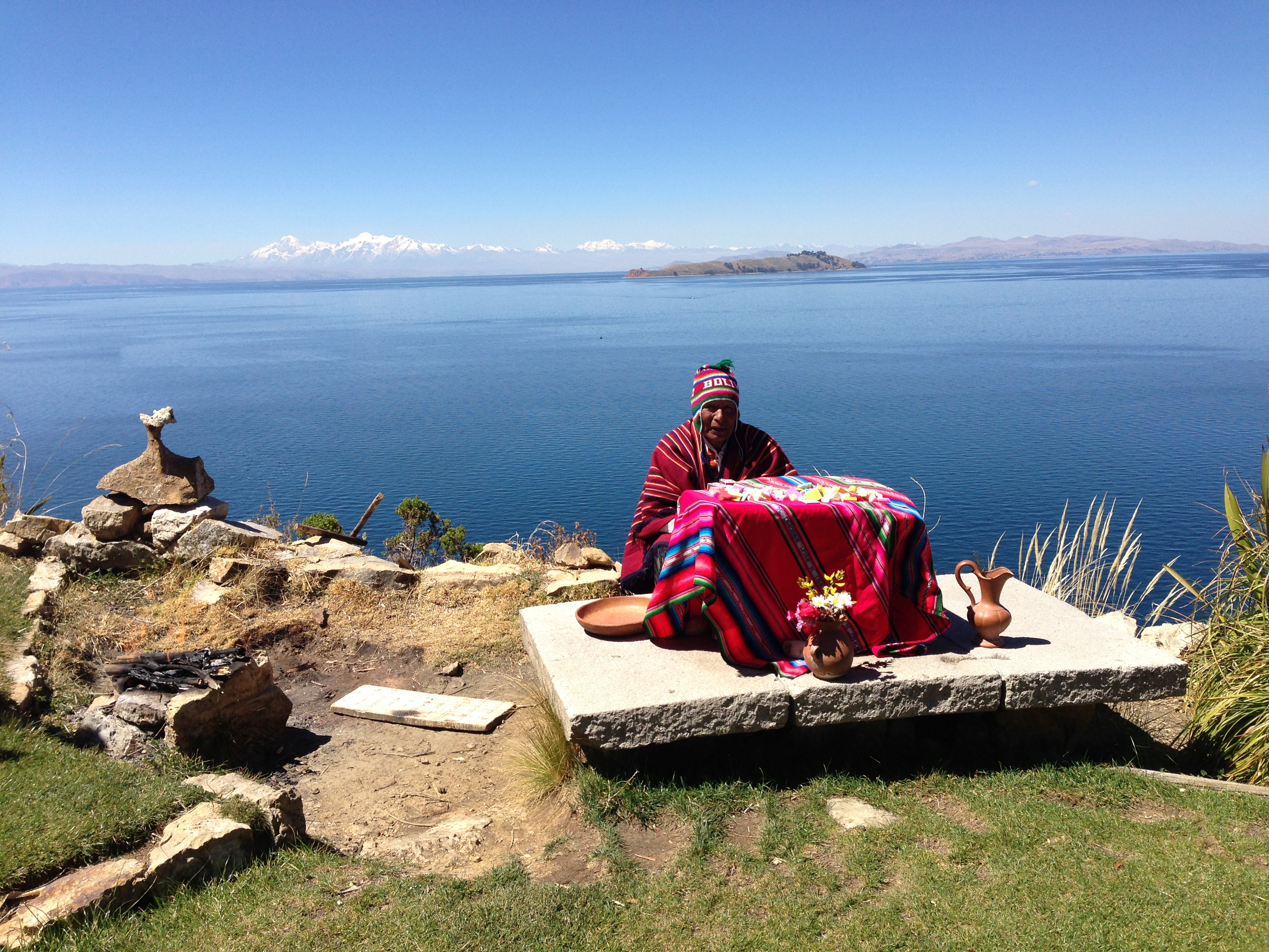 Traditional #Kallawaya Medicine Man & Kallawaya Ceremony at Tiwanaku Era Altar, Manco Kapac Lookout, Inta Wata Complex, Comunidad Yumani, Isla del Sol, Lake Titicaca, Manco Kapac Province, La Paz